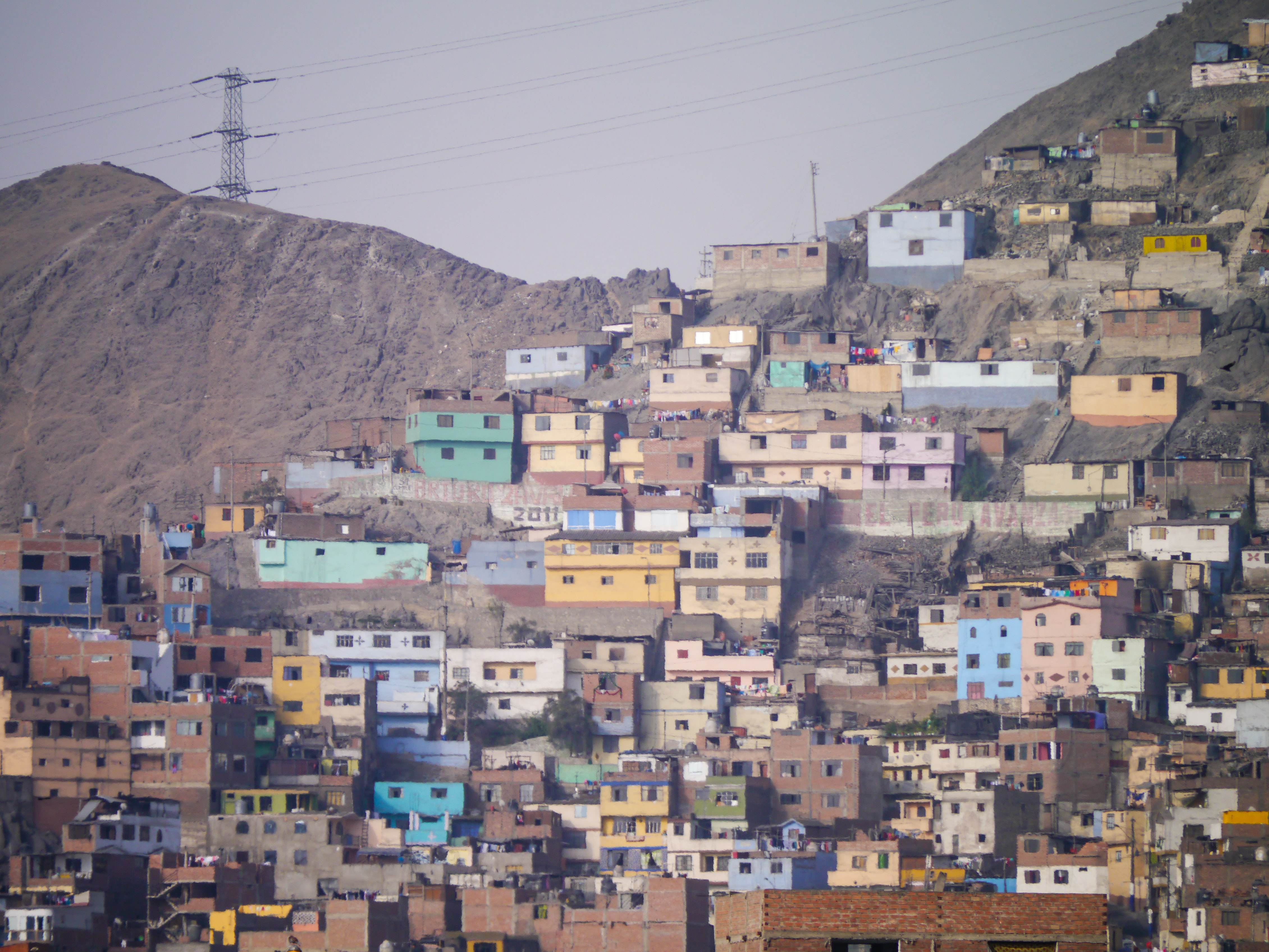 Lima, Peru